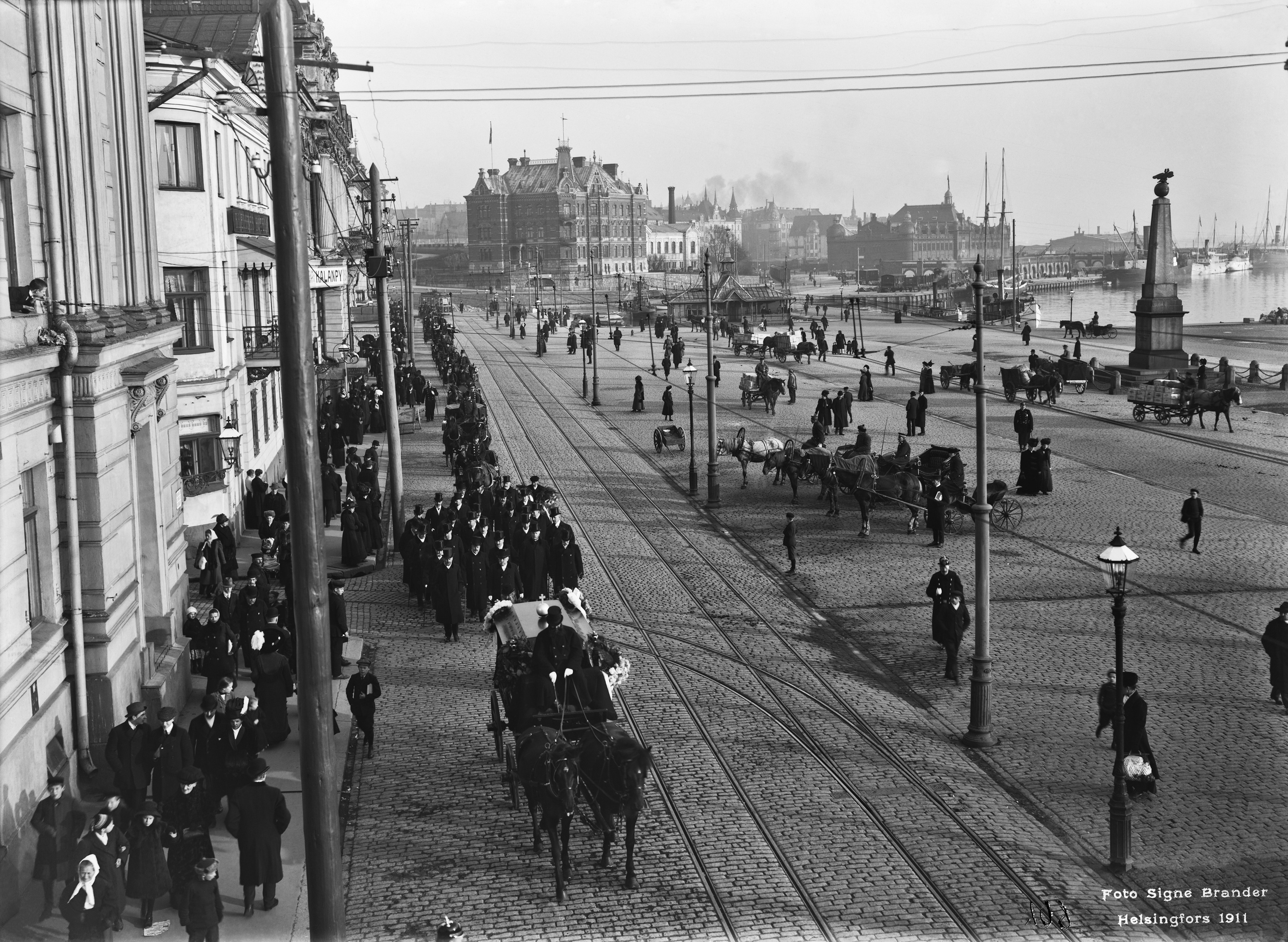 Kenraaliluutnantti Gustav Robert Ehrnroothin hautajaissaattue Pohjois Esplanaadikadulla (= Pohjoisesplanadi) matkalla Nikolainkirkosta Hietaniemen hautausmaalle kenraalin kotitalon kautta. Kenraali asui Mariankatu 7:ssä. G. R. Ehrnrooth s. 3.11.1821, k. 25.10.1911. -- negatiivi ja vedos, lasi paperi pahvi, mv